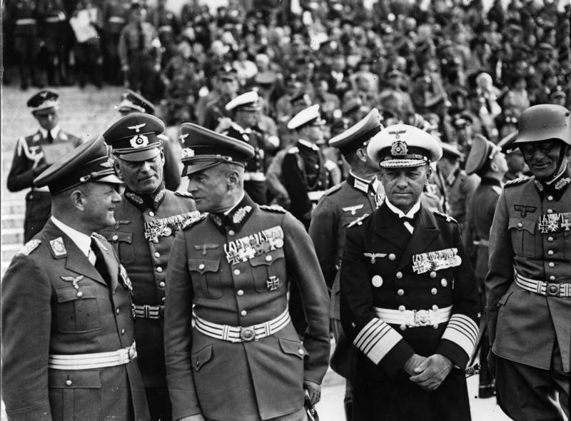 Nürnberg, Reichsparteitag, Tag der Wehrmacht Reichsparteitag Großdeutschland Tag der Wehrmacht. Während der ersten Vorführungen am Vormittag steht hier von Links: General der Flieger Milch, General der Artillerie Keitel, Generaloberst von Brauchitsch, Generaladmiral Raeder und General der Kavallerie und Kommandierender General des 13. Armeekorps (Nürnberg) Freiherr von Weichs. 12.9.38 AV. 52003 Abgebildete Personen: Milch, Erhard: Generalfeldmarschall, Ritterkreuz (RK), Luftwaffe, Deutschland (GND 118582402) Keitel, Wilhelm: Generalfeldmarschall, Ritterkreuz (RK), Heer, Deutschland (GND 118721577) Brauchitsch, Walther von: Generalfeldmarschall, Oberbefehlshaber des Heeres, Deutschland (GND 116414855) Raeder, Erich: Großadmiral, Oberbefehlshaber der Kriegsmarine, Deutschland (GND 118743511) Weichs, Maximilian von Freiherr: Generalfeldmarschall, Ritterkreuz, Heer, Deutschland (GND 117235202) Information added by Wikimedia users.EN Translation: Nuremberg, Reich Party Rally, Armed Forces Day Reich Party Rally The Greater Germany Military Day. During the first demonstration in the morning, from left: General of Aviators Milch, General of Artillery Keitel, Colonel-General von Brauchitsch, Admiral Raeder and General of Cavalry and Commanding General of the 13th Army Corps (Nuremberg) Baron von Weichs, Sept. 12th, 1938. [Note: "General of - - -" ranks in the German military were the equivalent of Lt. General.] Personal details: Milch, Erhard: Field Marshal, Knight's Cross (RK), Air Force, Keitel, Wilhelm: Field Marshal, Knight's Cross (RK), Army, Brauchitsch, Walther von: Field Marshal, Commander in Chief of the Army, Raeder, Erich: Admiral, Commander in Chief of the Navy, Weichs, Maximilian Baron von: Field Marshal, Knight's Cross, Army